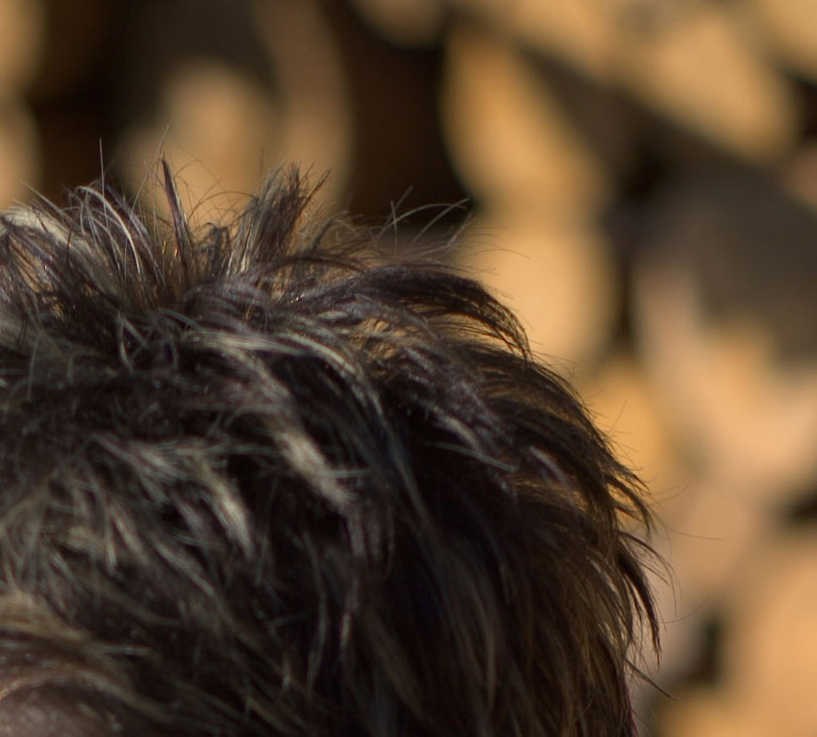 Przykład w miarę ładnego bokeh. Jasne punkty w tle przyjmują postać tarczek ciemniejących ku brzegom. Zdjęcie wykonano standardowym obiektywem stałoogniskowym Pentax SMC M 50/1.7 Jestem autorem zdjęcia - Andrzej Makarczuk.